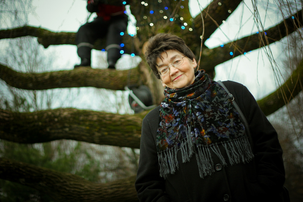 Taimetark Aili Paju 2009. aastal Tartus, Emajõe ääres.